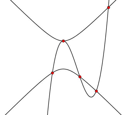 Sistema de equações de cinco soluções.